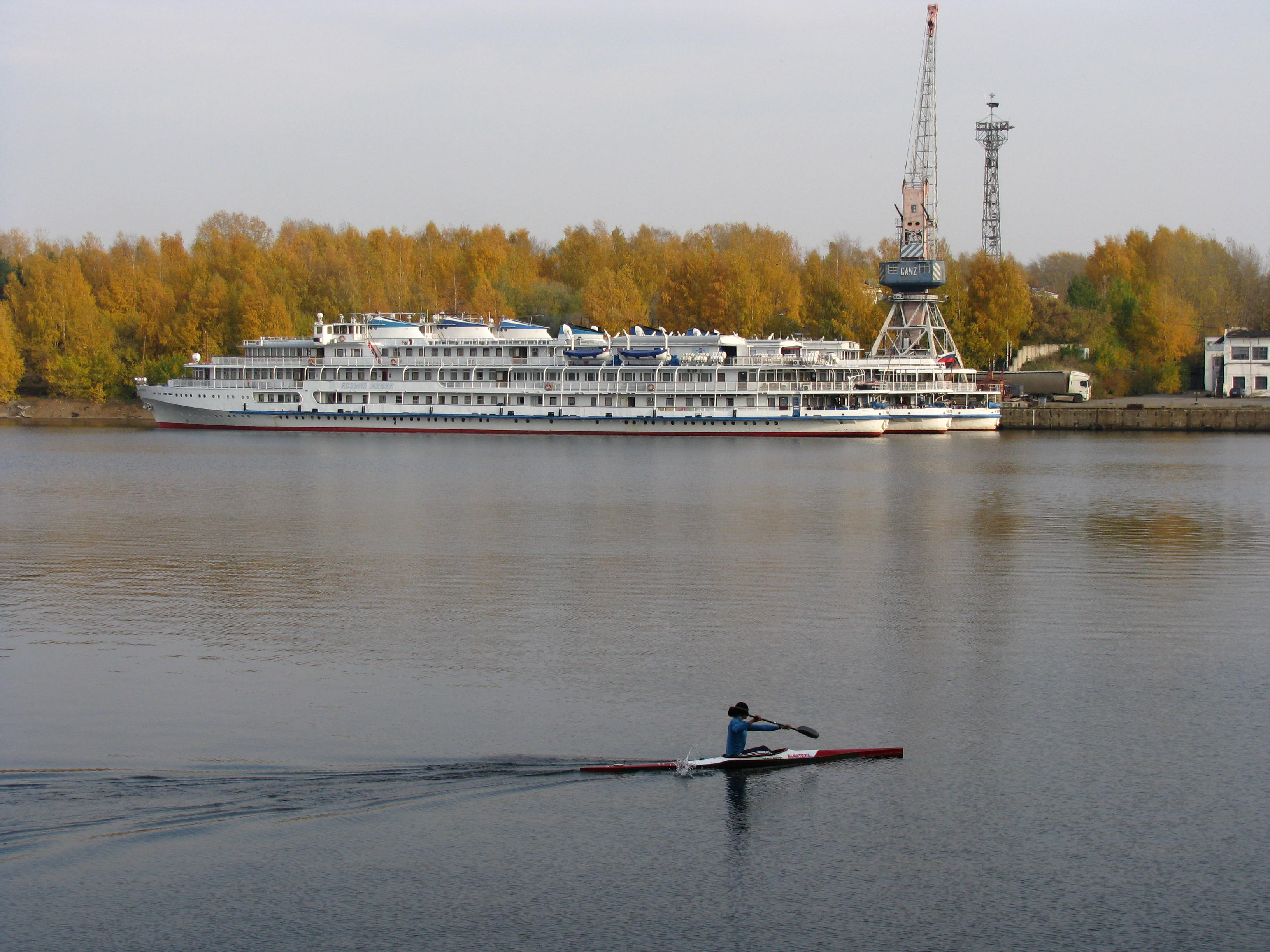 Гавань г. Чайковского (Пермский край)